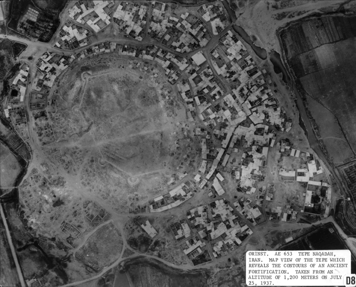 تۆرکجه: سولدوز شهری 1316 جی شمسی ایل لرده گوروشن تپه و قالا نقده ین قالا باشی تپه سی دیر.